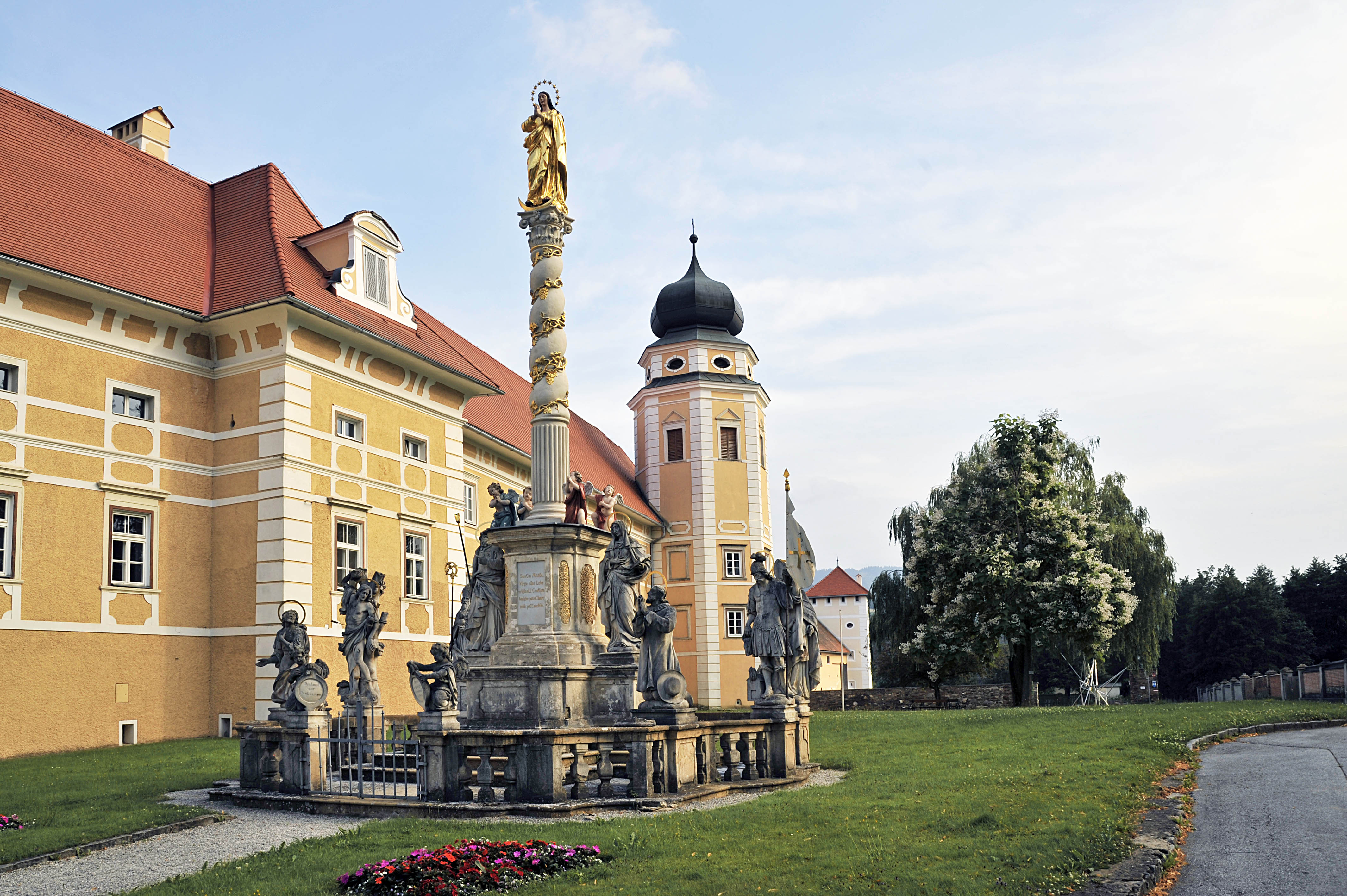 Stift Vorau Mariensäule